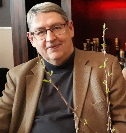 Yves Bizeul bei einem Tagungsessen Depicted person: Yves Bizeul – French political scientist and theologian